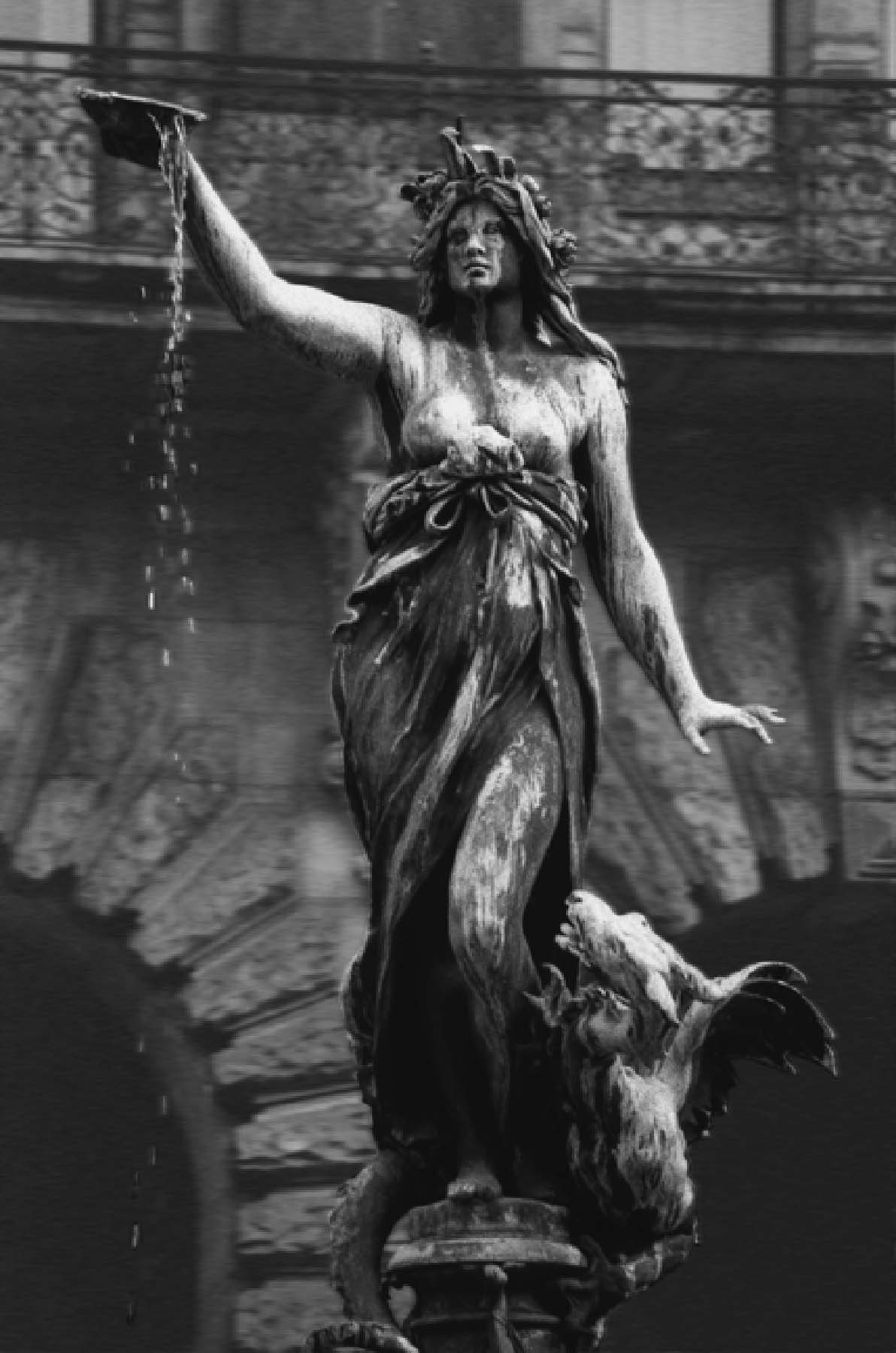 Hygieia als Mahnung an die Cholera 1892 in Hamburg